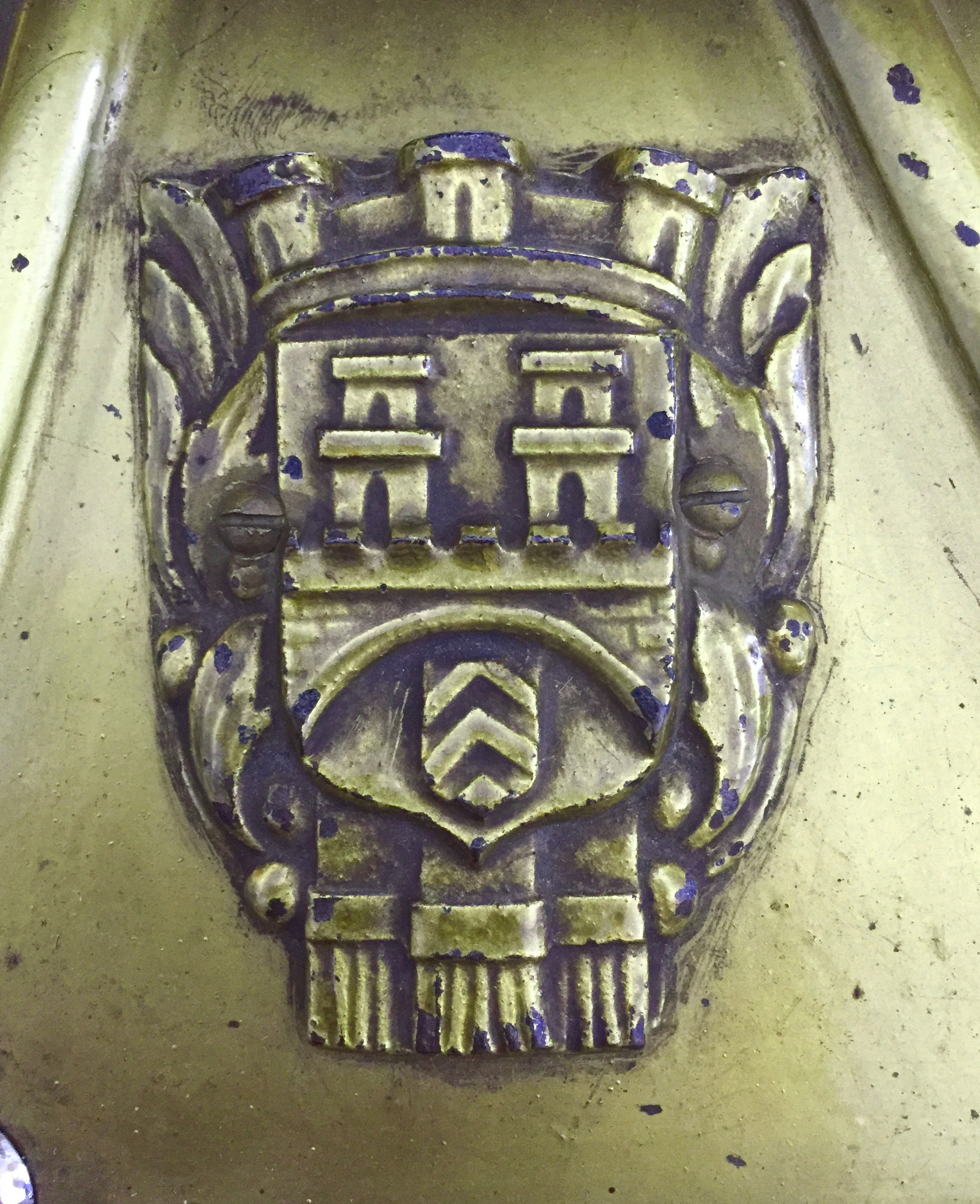 Markenemblem der Flügel- und Pianofabrik Th. Mann & Co., Bielefeld auf dem Stutzflügel in Eiche Nr. 16750 vor Reinigung.